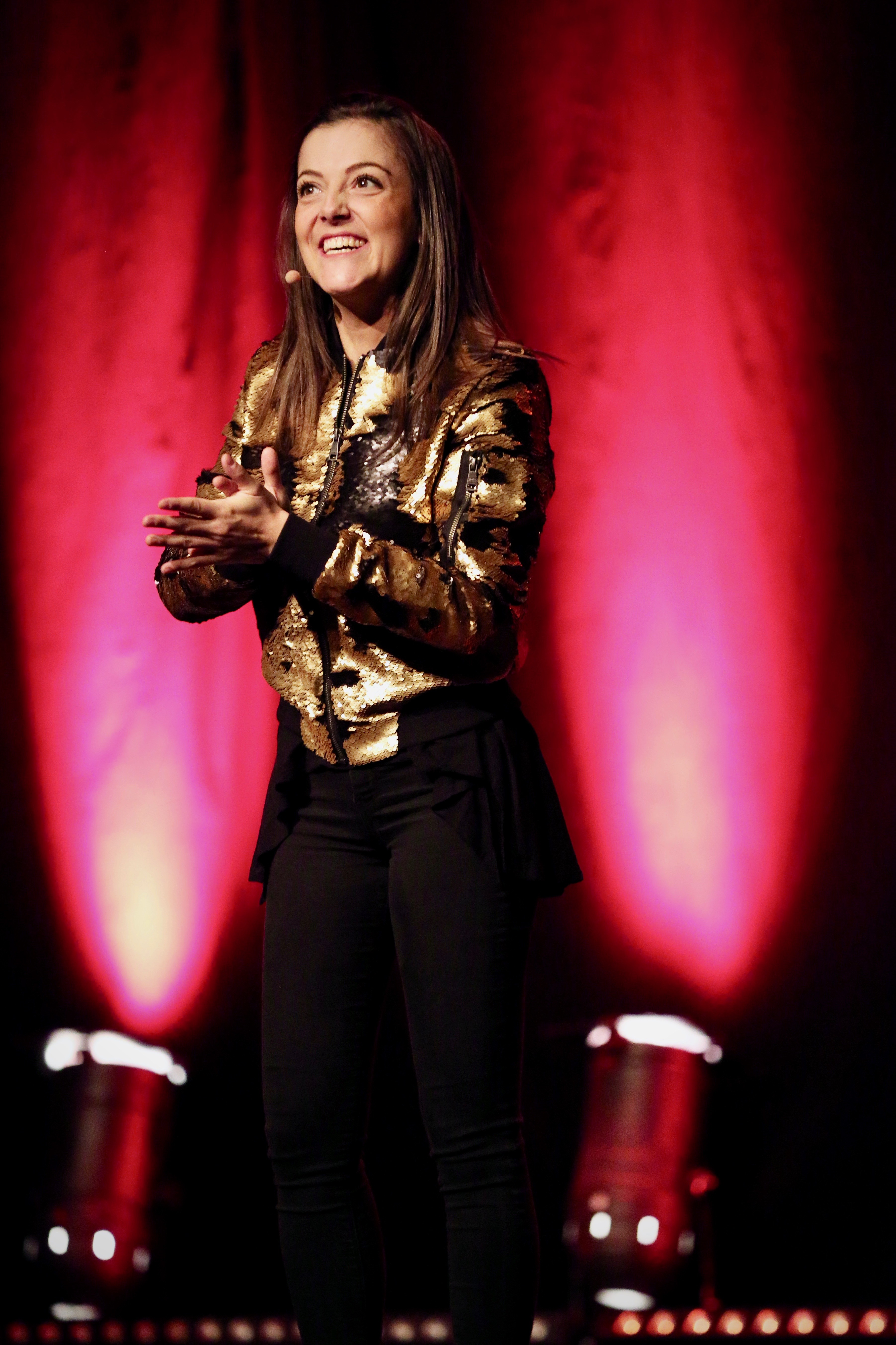 Camille Lellouche sur scène